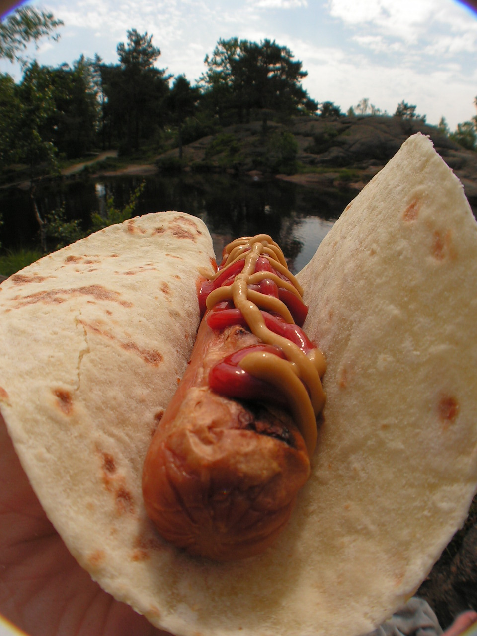 "Pølse med lompe", uma especialidade da Noruega. "Pølse med lompe", a delicacy from Norway.